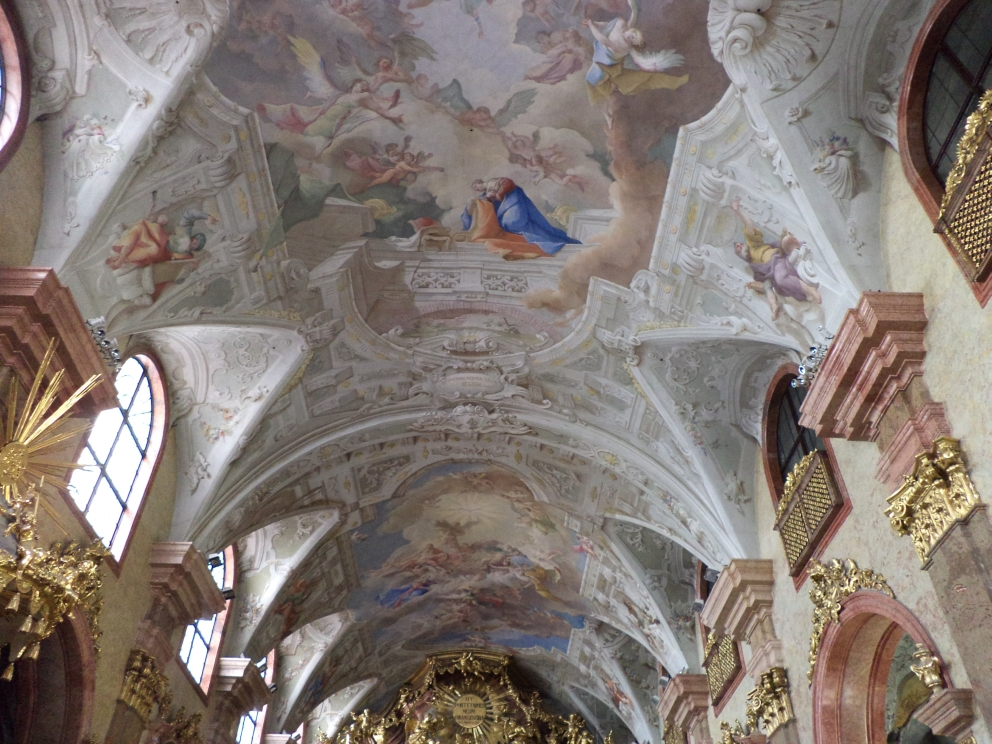 Loyolai Szent Ignác templom freskója Győrben